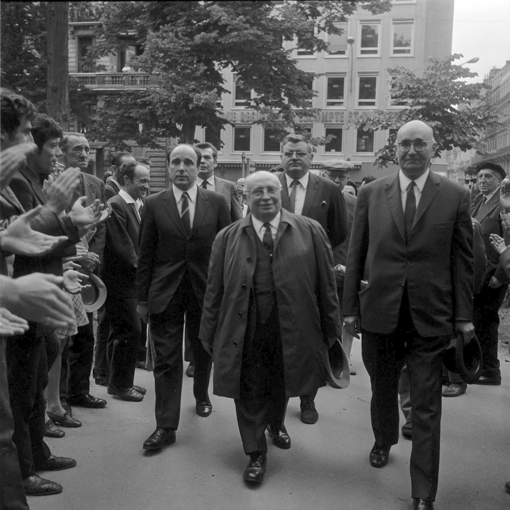 Square Charles-de-Gaulle. 23 mai 1969. Vue de messieurs Jacques Duclos, sénateur communiste, candidat à l'élection présidentielle, Jean Llante, premier secrétaire de la fédération communiste de la Haute Garonne, et Jean-Baptiste Doumeng, maire communiste de Noé (Haute-Garonne), lors d'un dépôt de gerbe devant la statue de Jean-Jaurès, à l'occasion de la campagne des élections présidentielles.